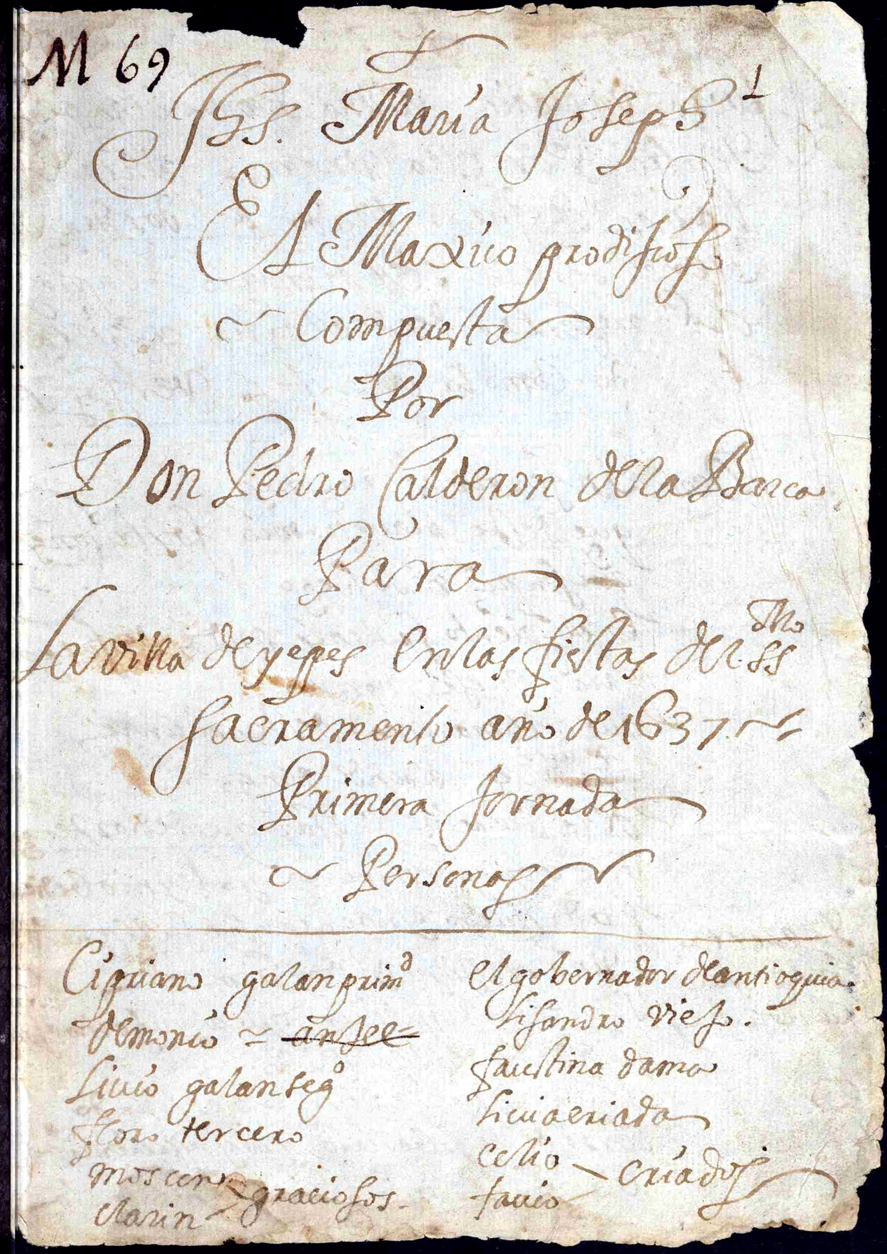 Comienzo_de_El_mágico_prodigioso_(manuscrito autógrafo)